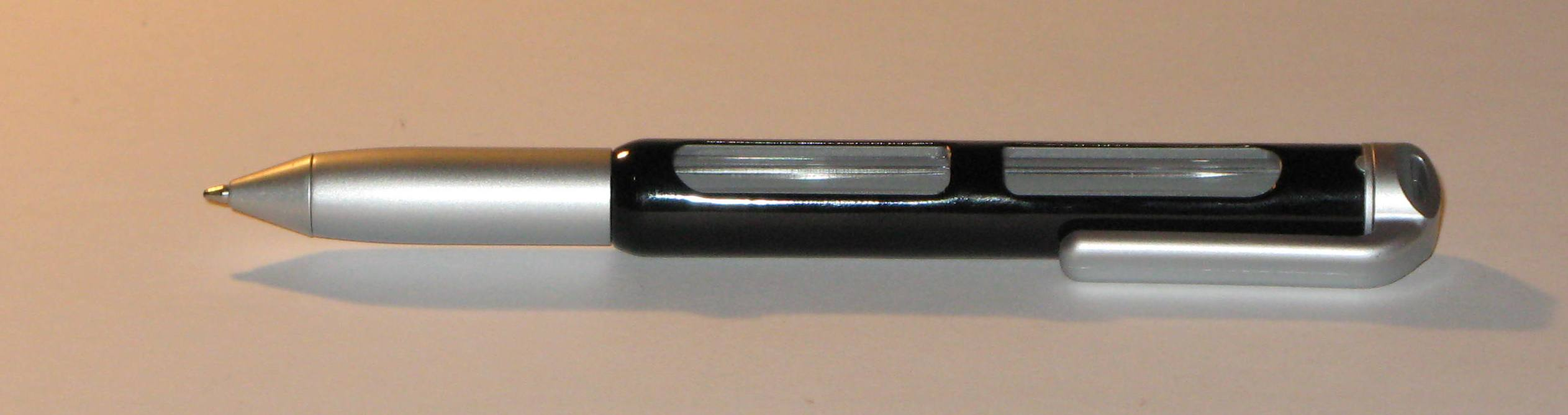 E Liesbic.